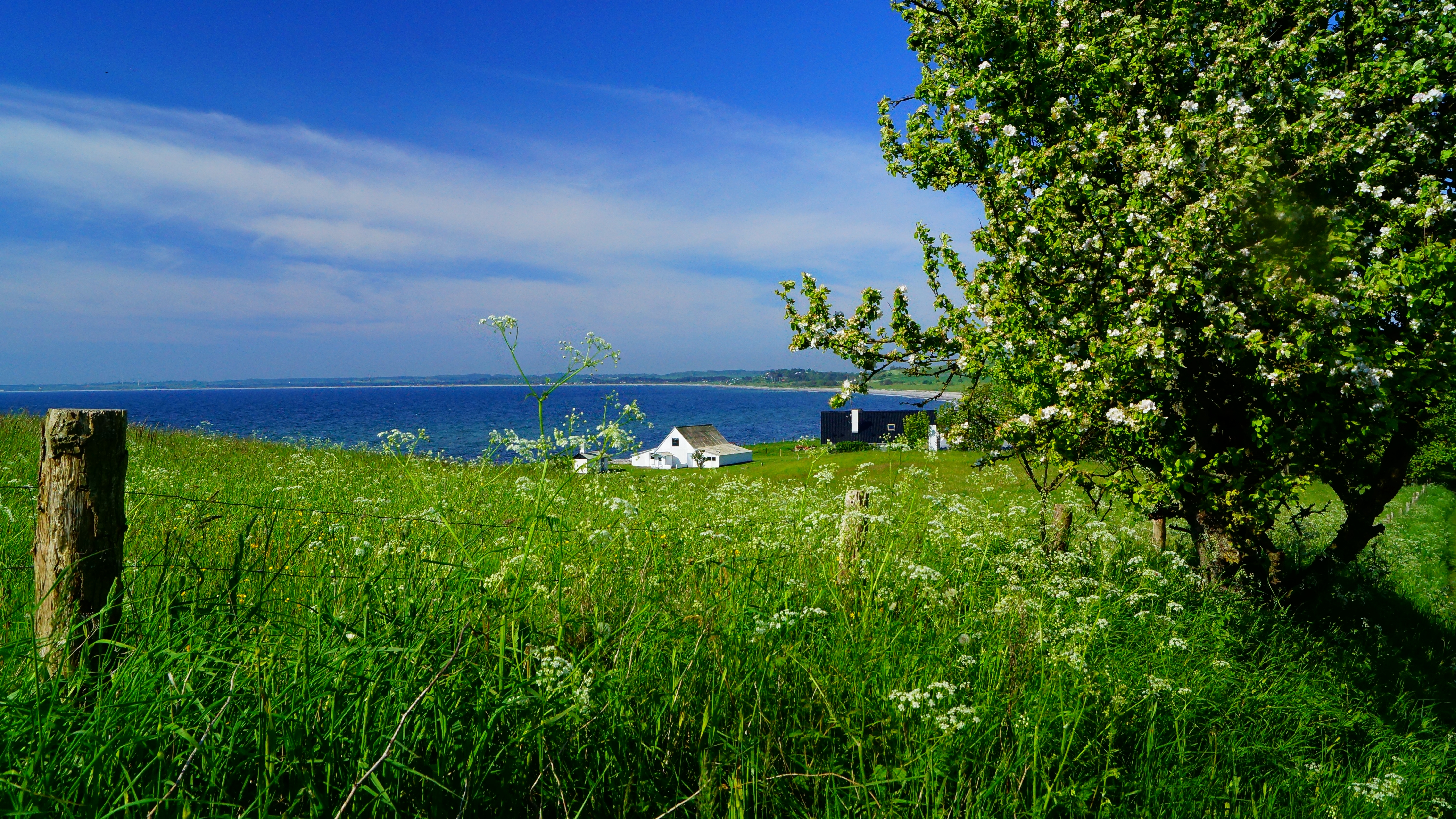 Jernhatten, udsigt, syd, mod Dråby Bugt